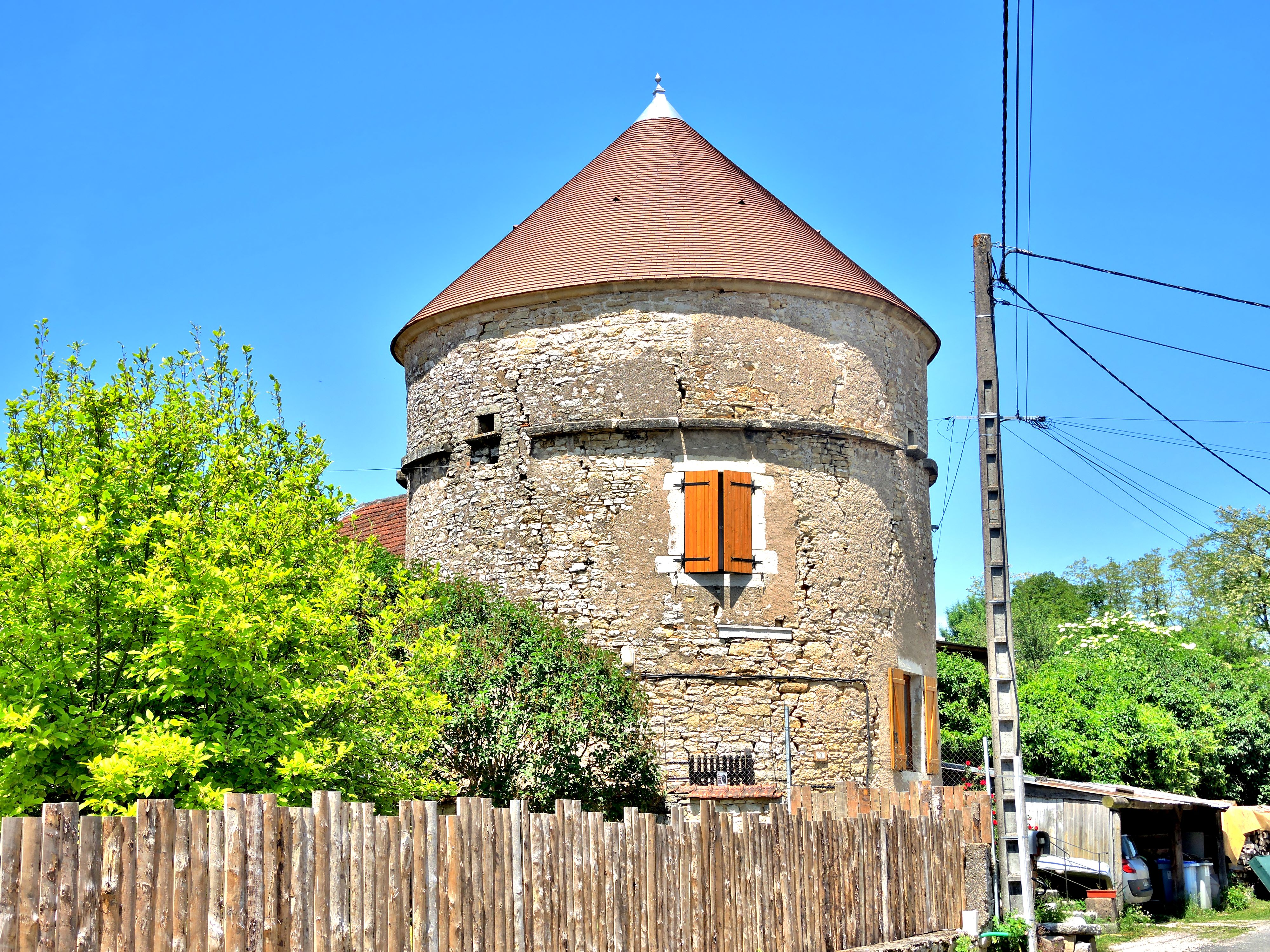 Tour-maison d'habitation, à Marpain. Dammartin-Marpain. Jura